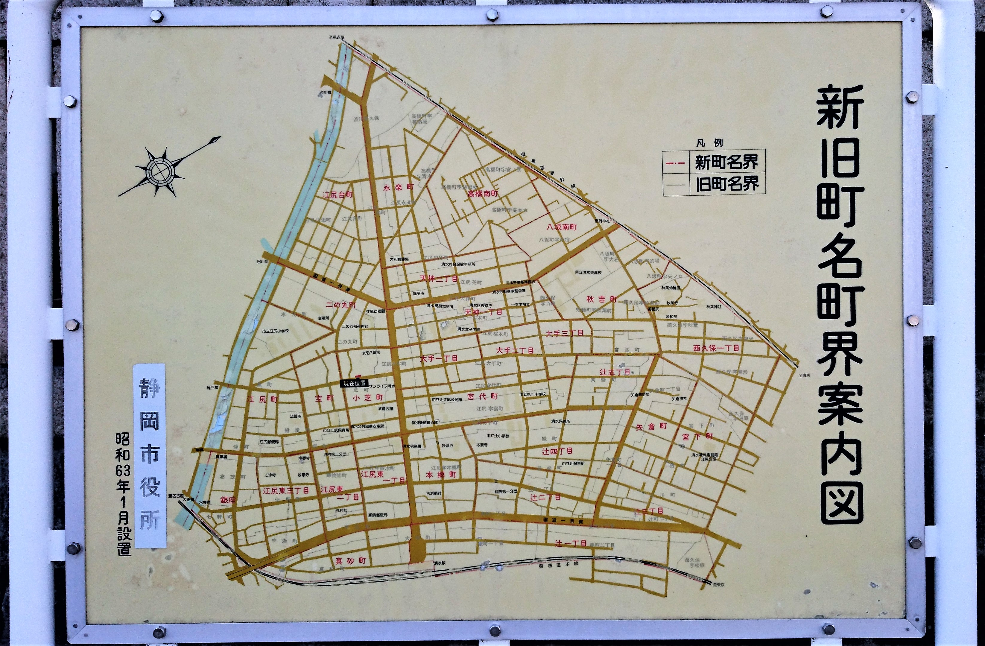 静岡県静岡市清水区辻地区、江尻地区の町名案内看板（清水区小芝町）